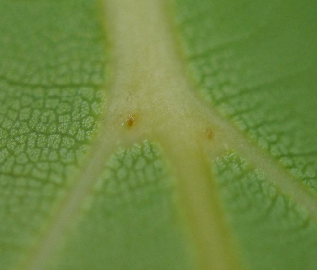 Cinnamomum camphora：クスノキのダニ室 2017/06/04 和歌山県田辺市：Tanabe City. Wakayama Pref. Japan